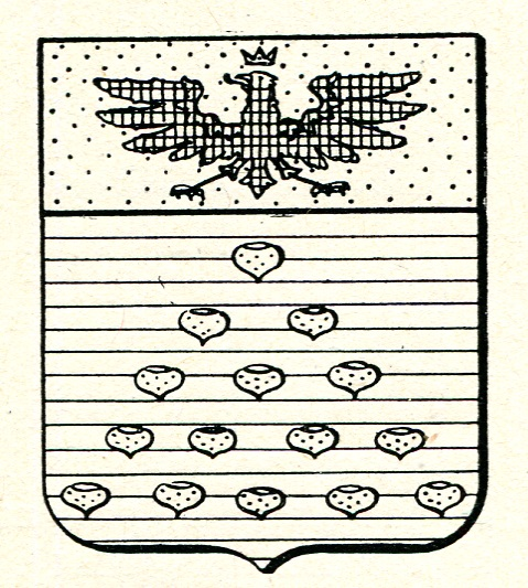 Stemma della famiglia bresciana dei Mondella